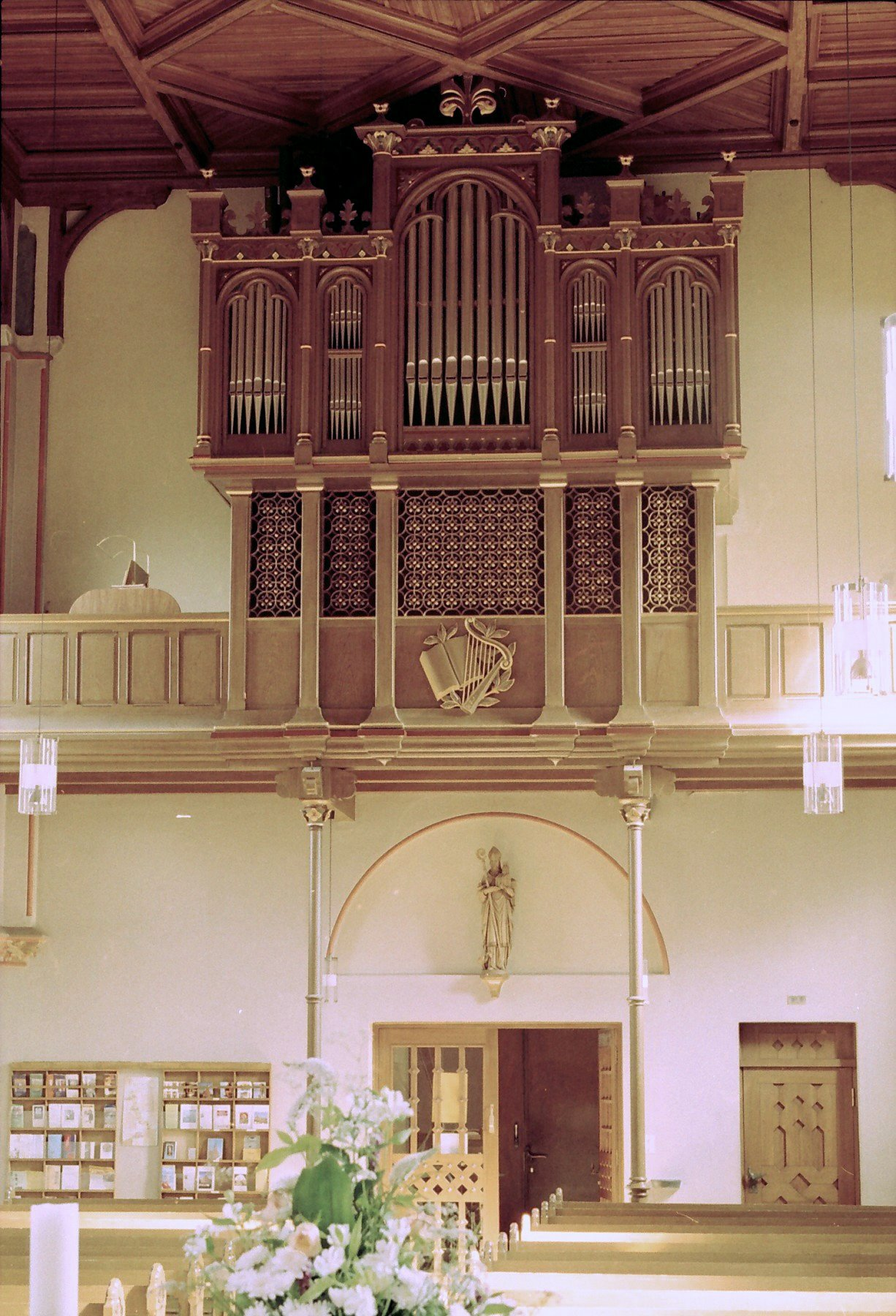 Orgel in der kath. St. Ludgerus Kirche Norden